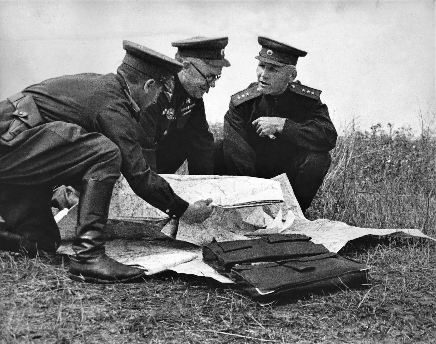 Заместитель Верховного главнокомандующего Маршал Советского Союза Г.К. Жуков и командующий Степным фронтом генерал-полковник И.С. Конев в период Курской битвы